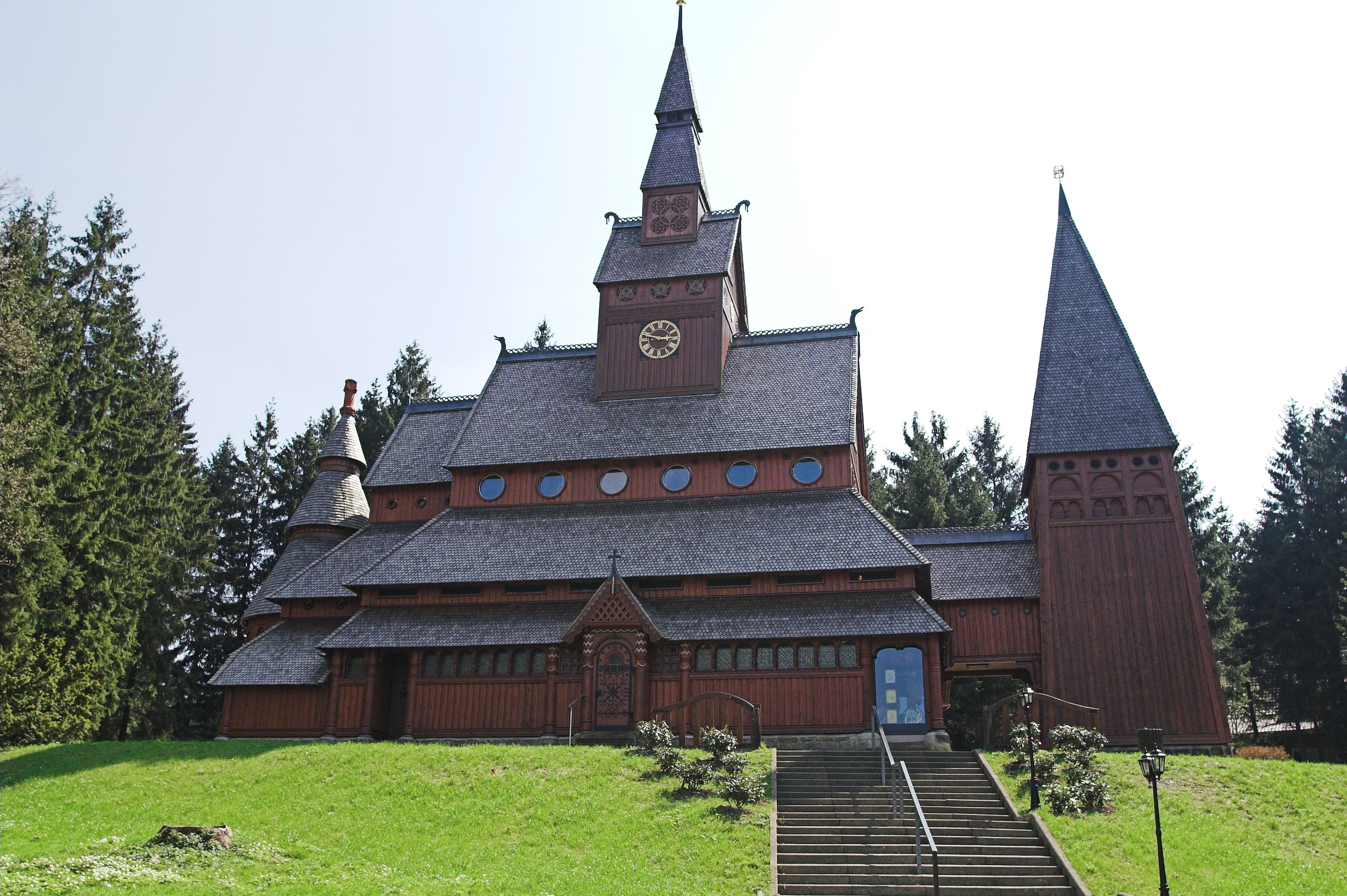 Nordseite der Stabkirche in Hahnenklee